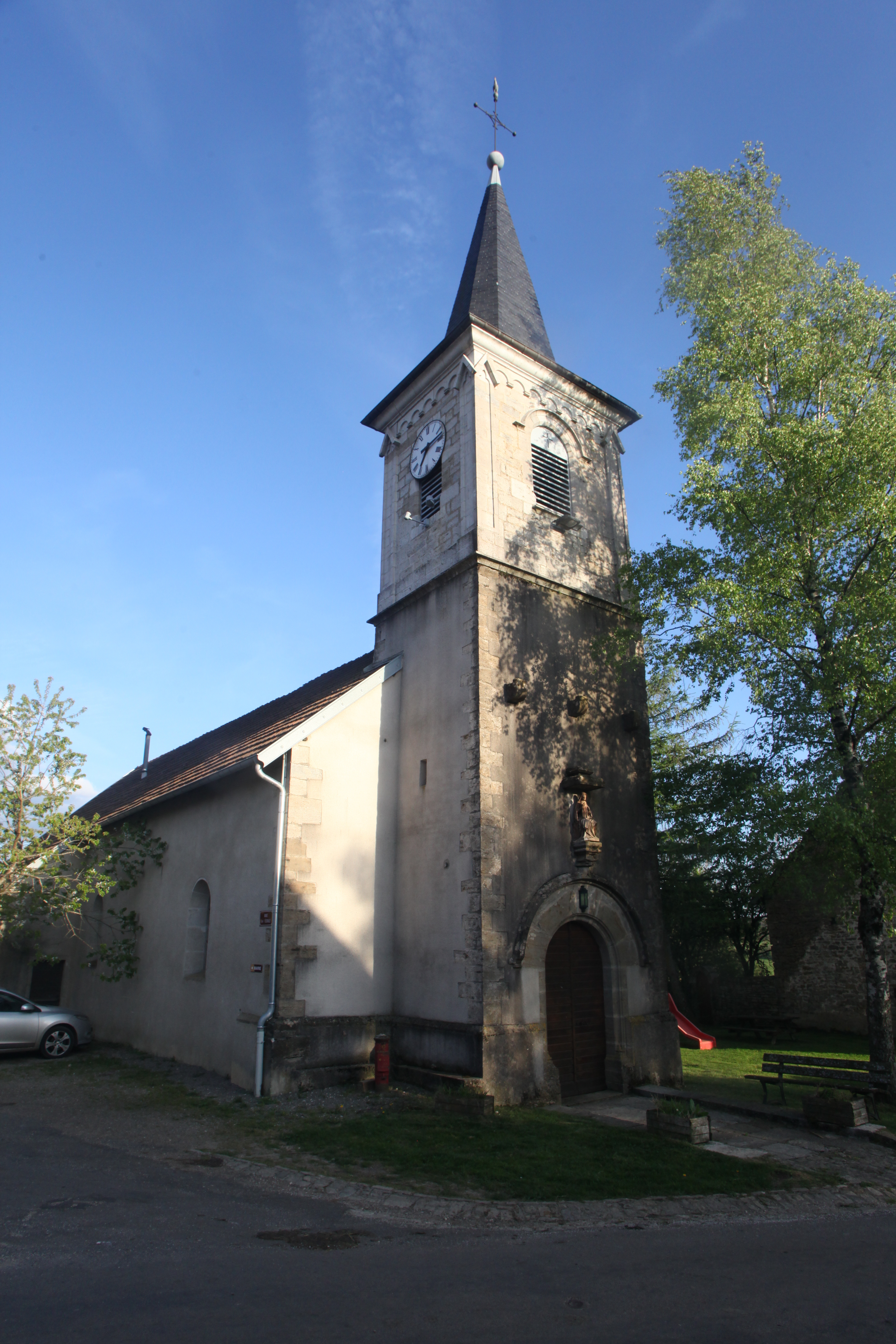 Église de By (Doubs).